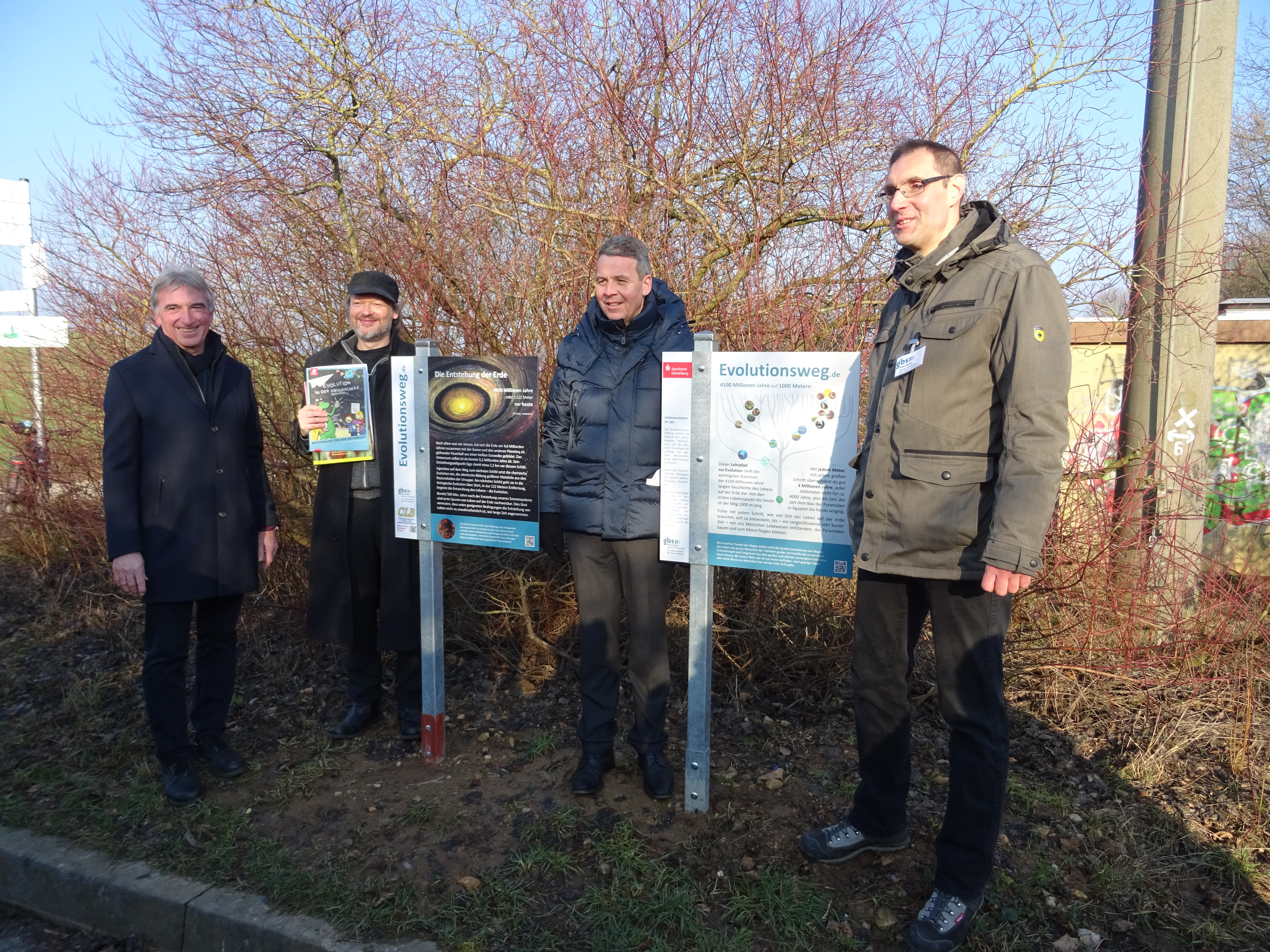 Einweihung des Evolutionswegs in Leimen-Gauangelloch. Die Einweihung des Evolutionswegs in Leimen-Gauangelloch erfolgte am 21.1.2019 in Anwesenheit von (von links) Karl Klein (Landtagsabgeordneter Baden-Württemberg), Dr. Michael Schmidt-Salomon (Sprecher Giordano-Bruno-Stiftung GBS), Hans D. Reinwald (Oberbürgermeister von Leimen) sowie Dirk Winkler (1. Vorsitzender der GBS-Regionalgruppe Rhein-Neckar).